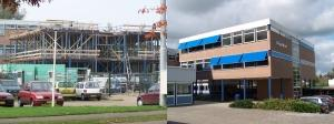 Nieuwbouw VZL